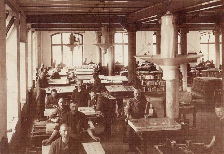 Umdruckerei der Fa. Gebr. Klingenberg in Detmold